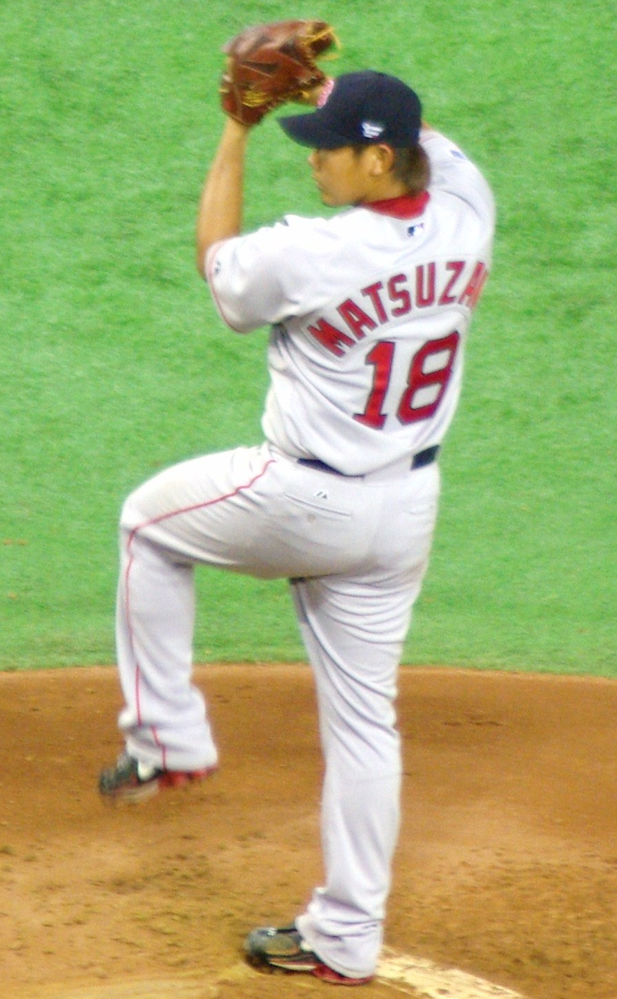 Daisuke Matsuzaka